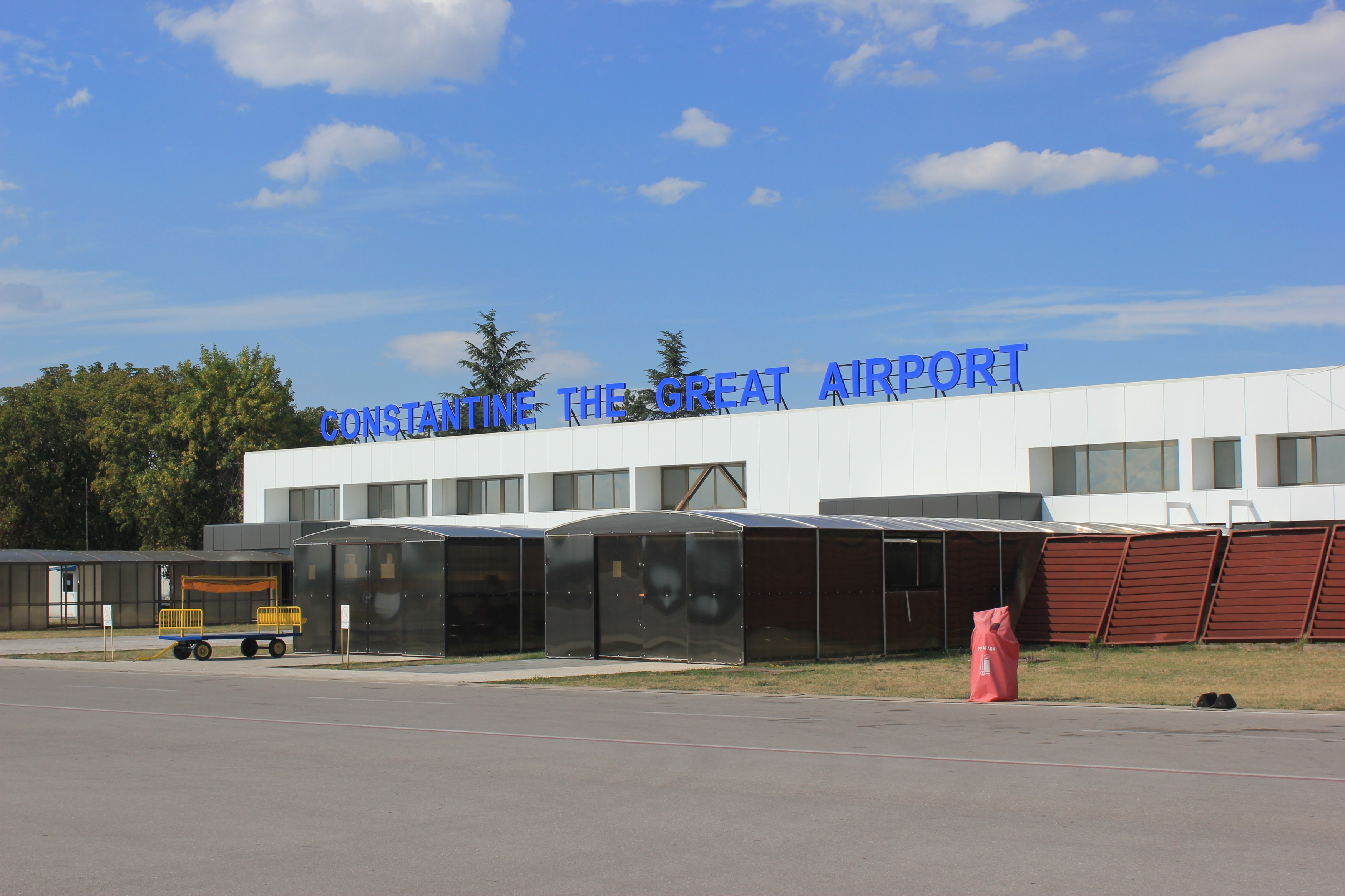 Empfangsgebäude des Flughafens Konstantin der Große in Niš, Serbien.